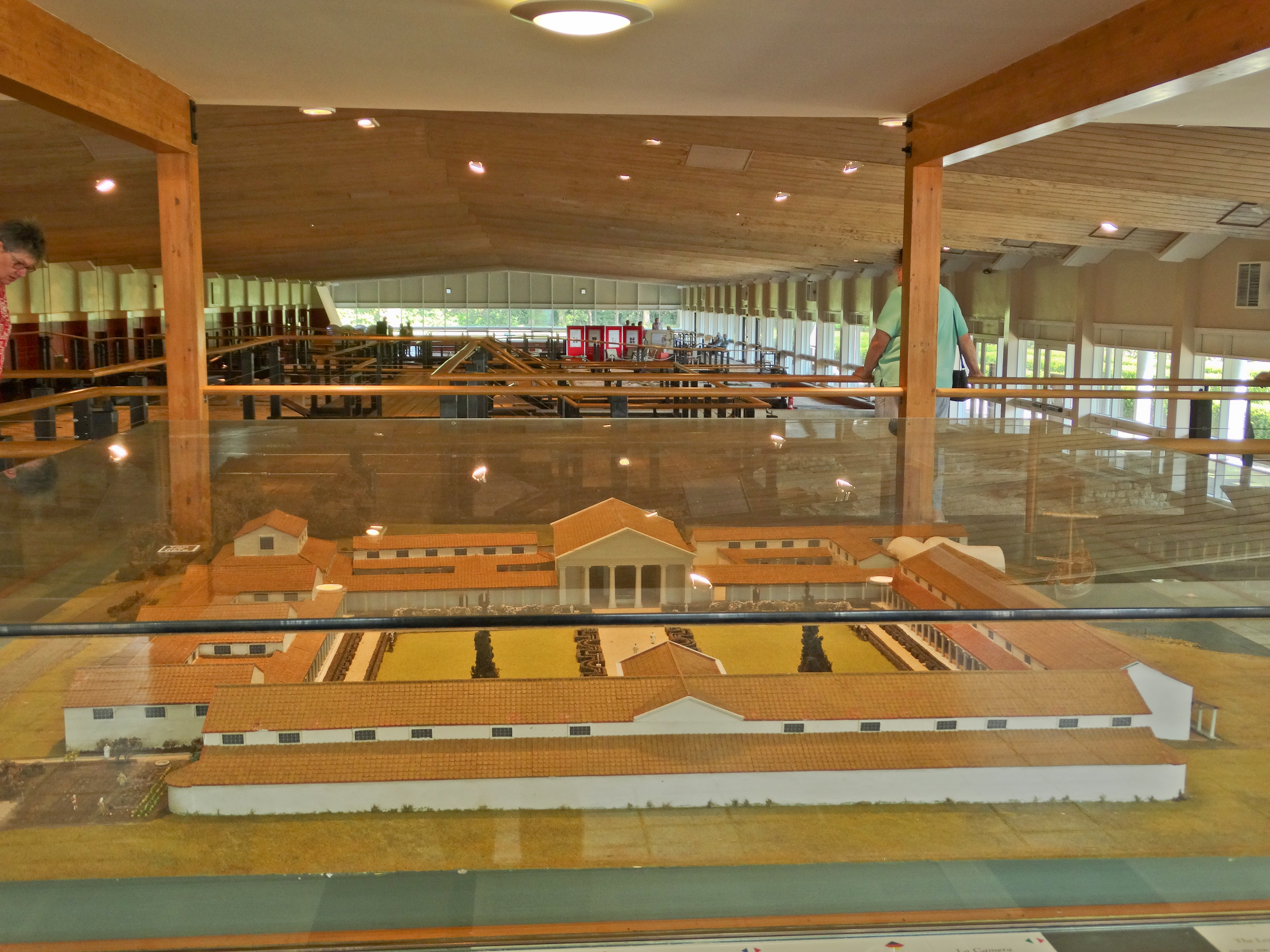 Fishbourne Roman Palace innen mit Modell